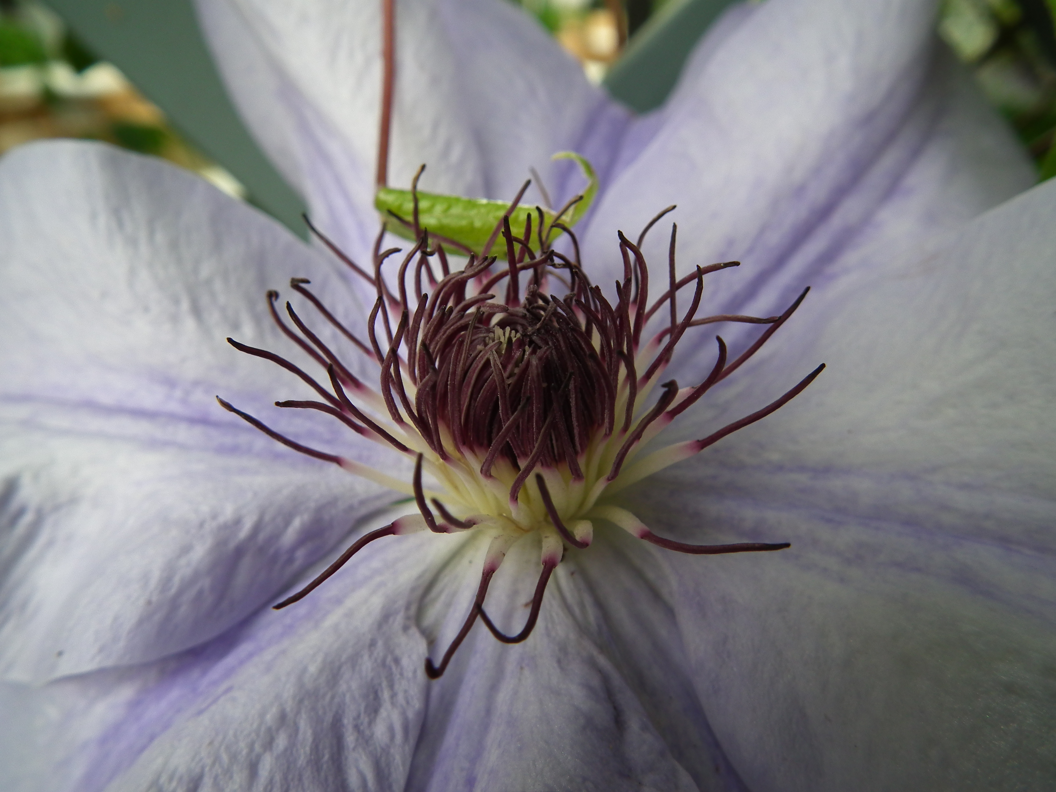 Waldreben (Clematis), fotografiert in Schwetzingen (Baden-Württemberg, Deutschland)